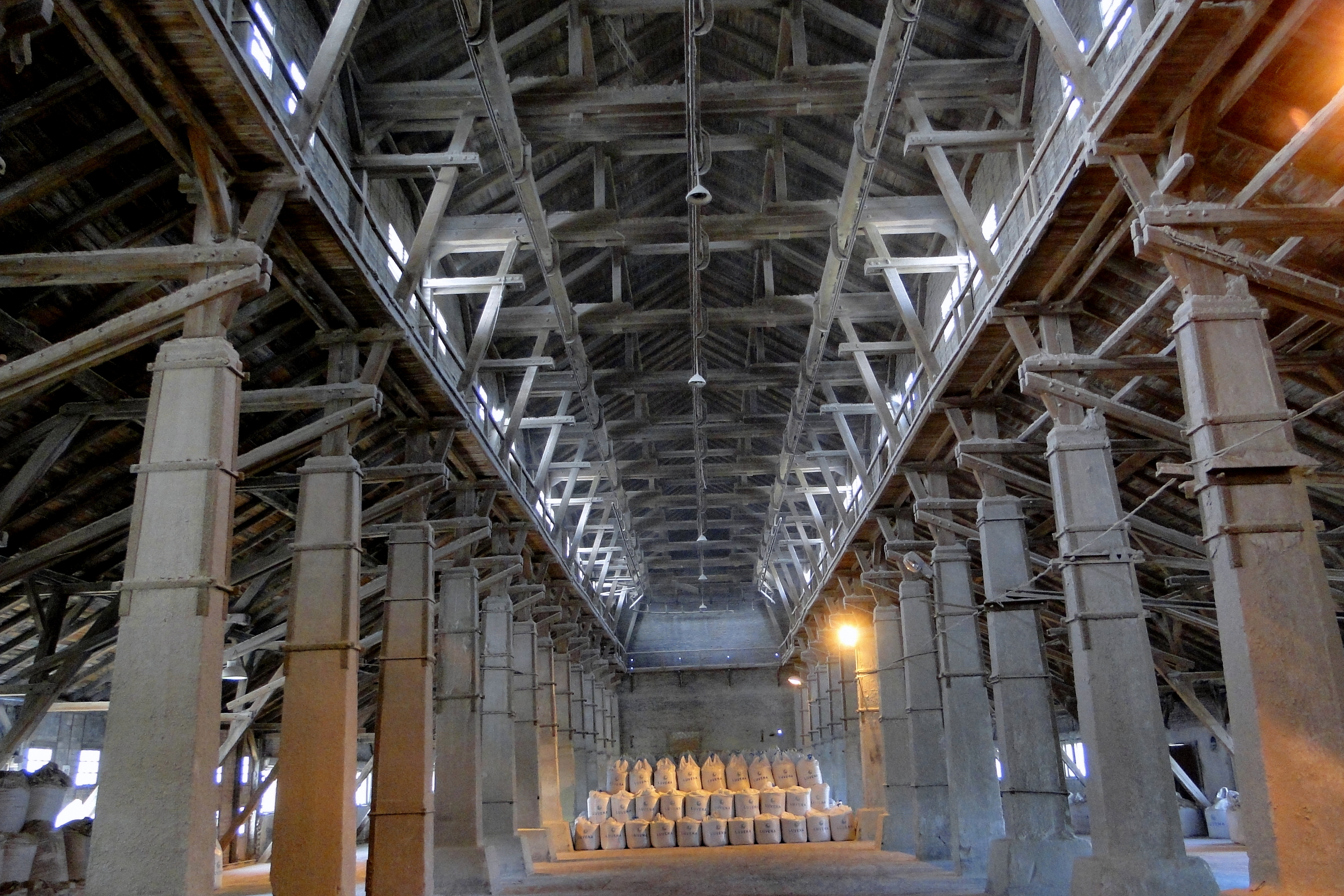 Magazyn superfosfatu – „hala Poelziga” (wnętrze)